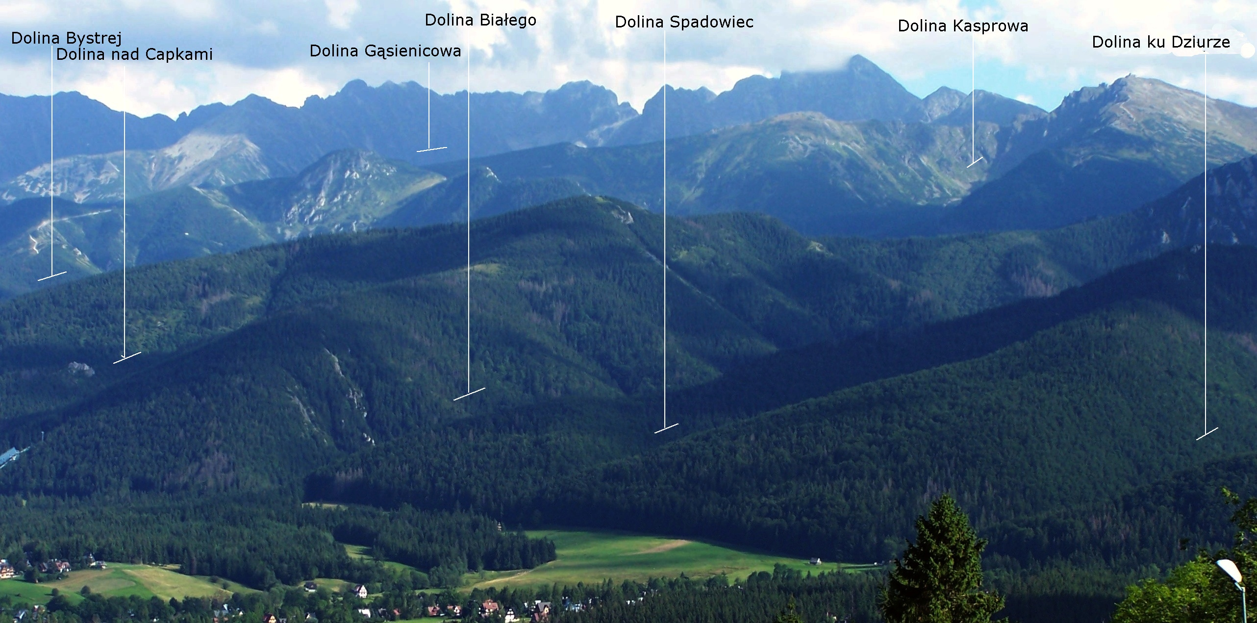 Widok spod Szymoszkowej kolejki linowej